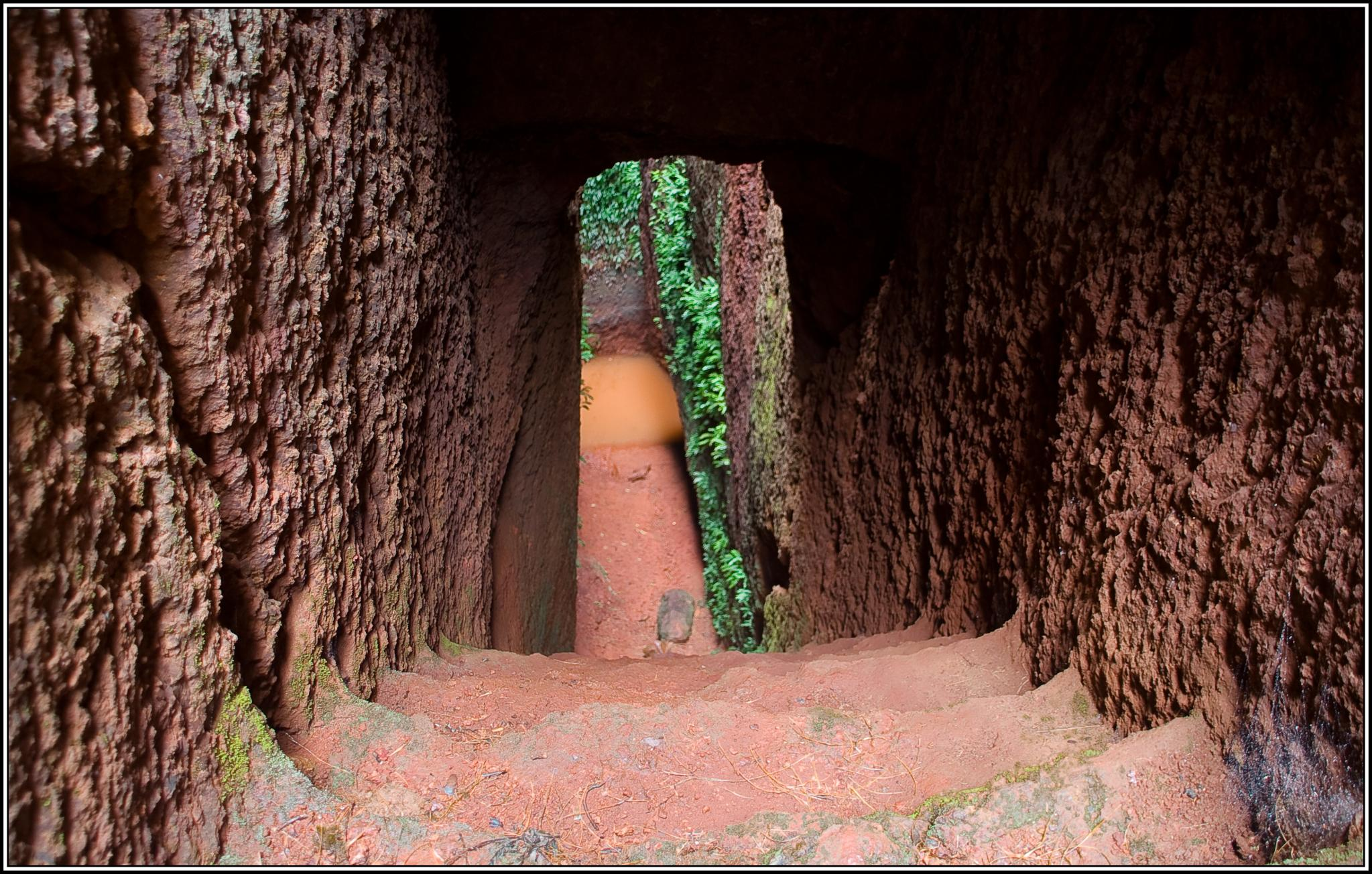 Kamalgad fort, Maharashtra, India